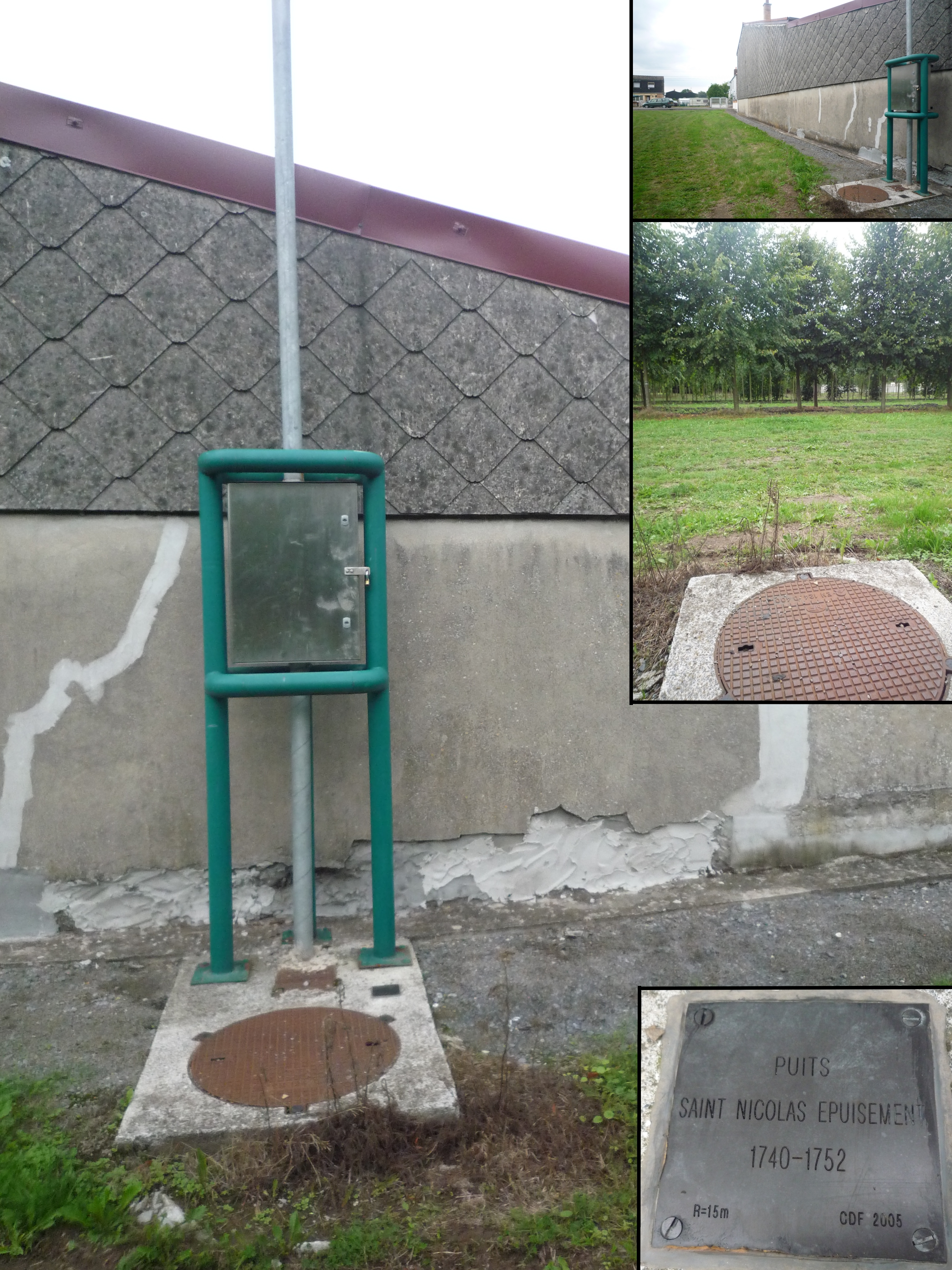 Puits Saint Nicolas Épuisement de la Compagnie des mines d'Anzin à Fresnes-sur-Escaut, Nord, Nord-Pas-de-Calais, France.